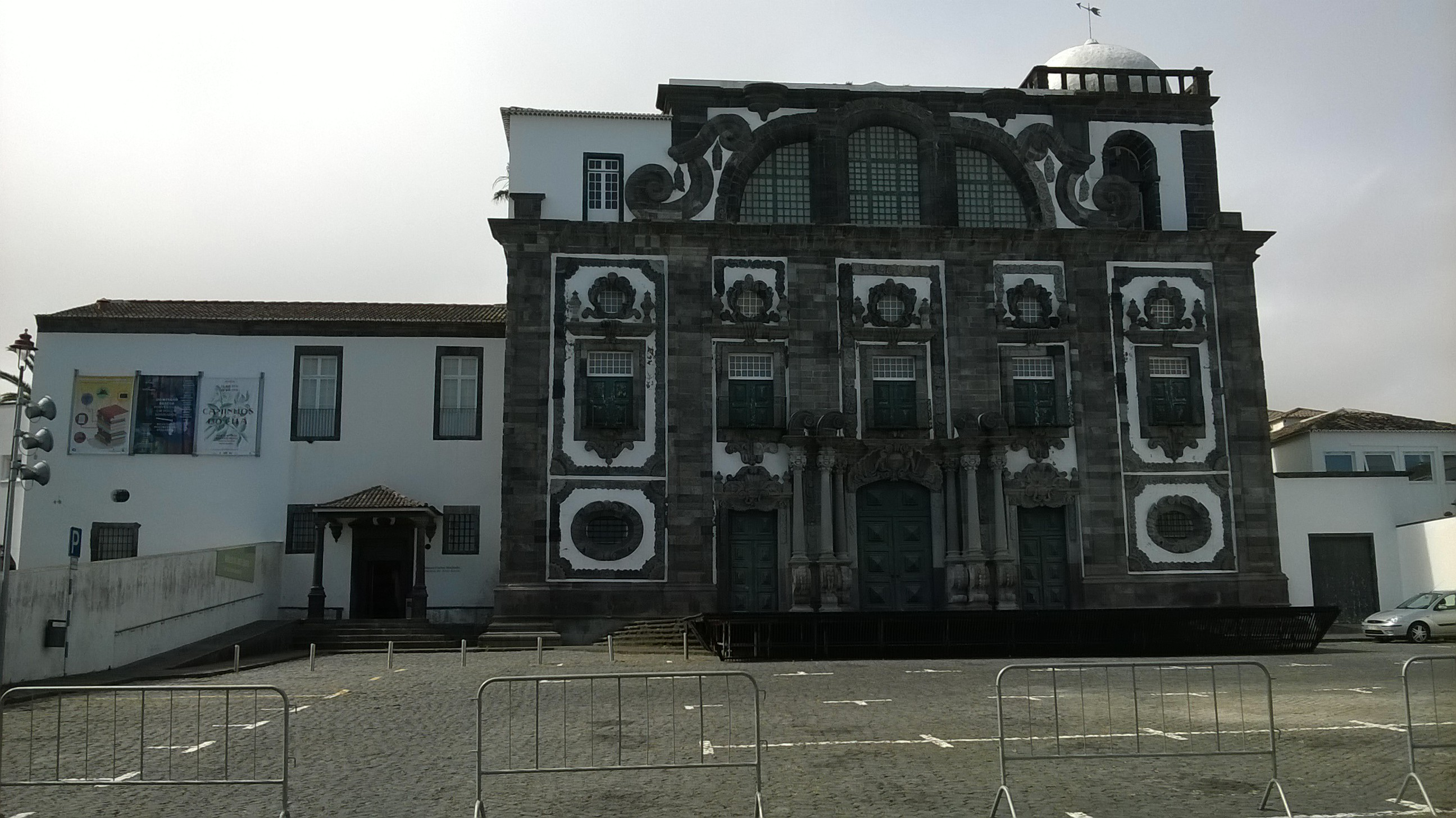 Igreja do Colégio dos Jesuítas, concelho de Ponta Delgada, ilha de São Miguel, Região Autónoma dos Açores, Portugal.